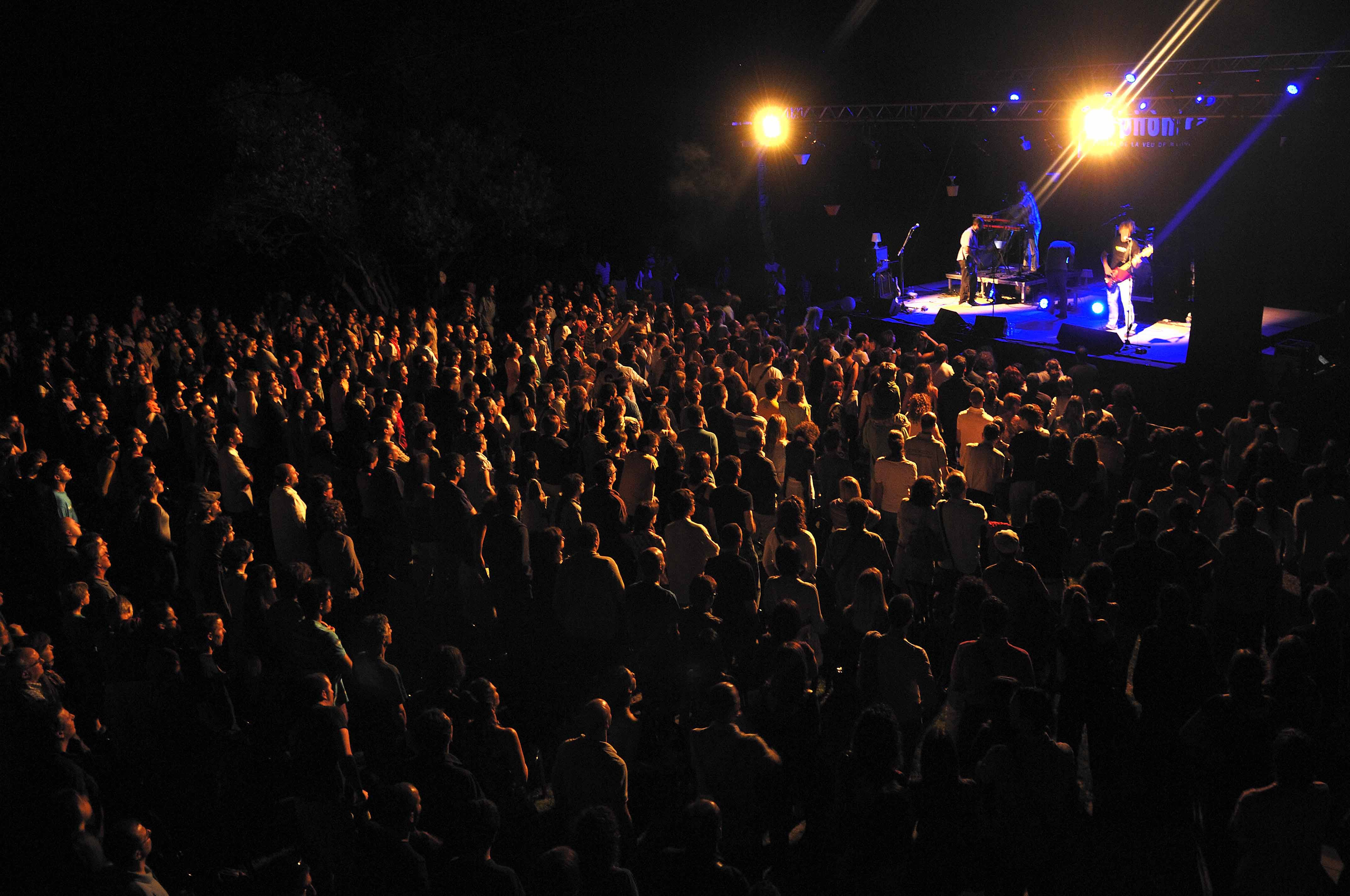 Concert d'Antònia Font al Club Natació Banyoles